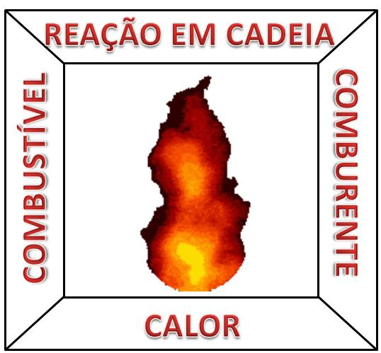 Tetraedro do fogo e seus quatro elementos formadores: Combustível, comburente, calor e Reação em cadeia.